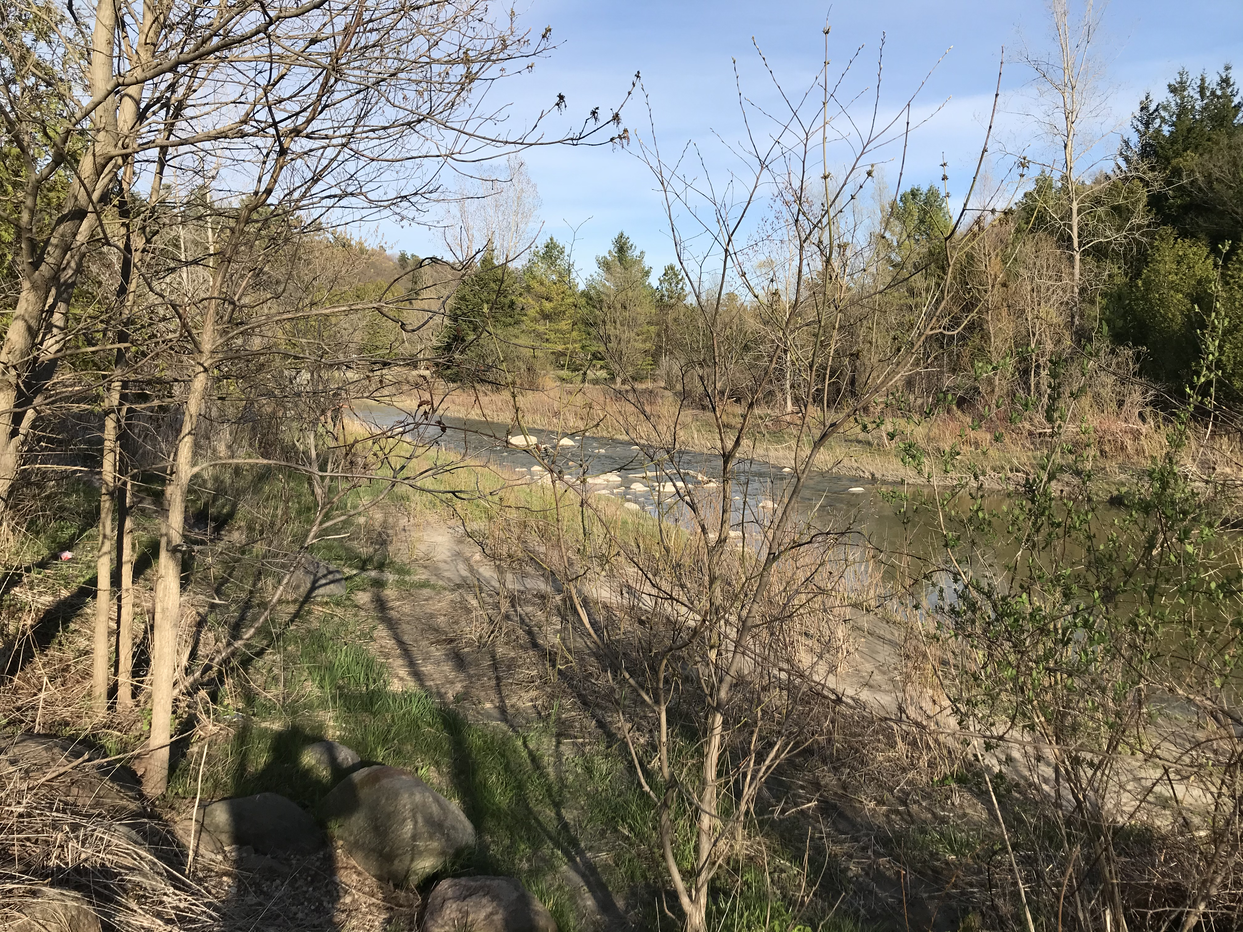 کوردی: دیمەنێک لەباخچەی نیشتمانی ڕۆوژ.